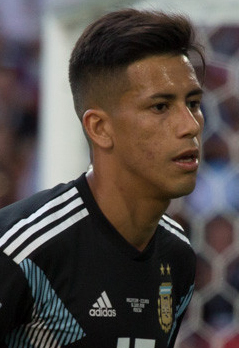 Месси и Ко не смогли обыграть неуступчивых исландцев